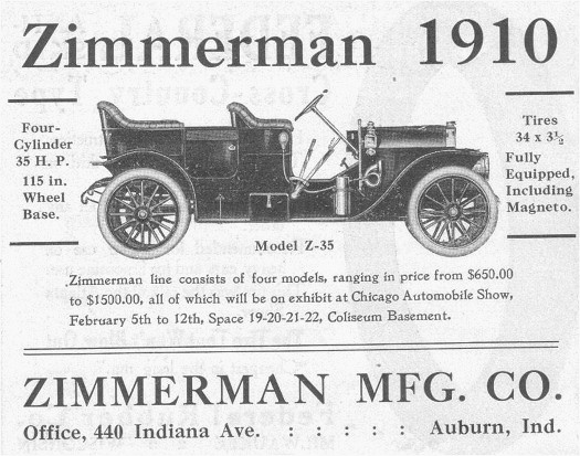 1910 Zimmerman 35 hp Model 35 Touring with a 302 ci 4 cylinder engine.